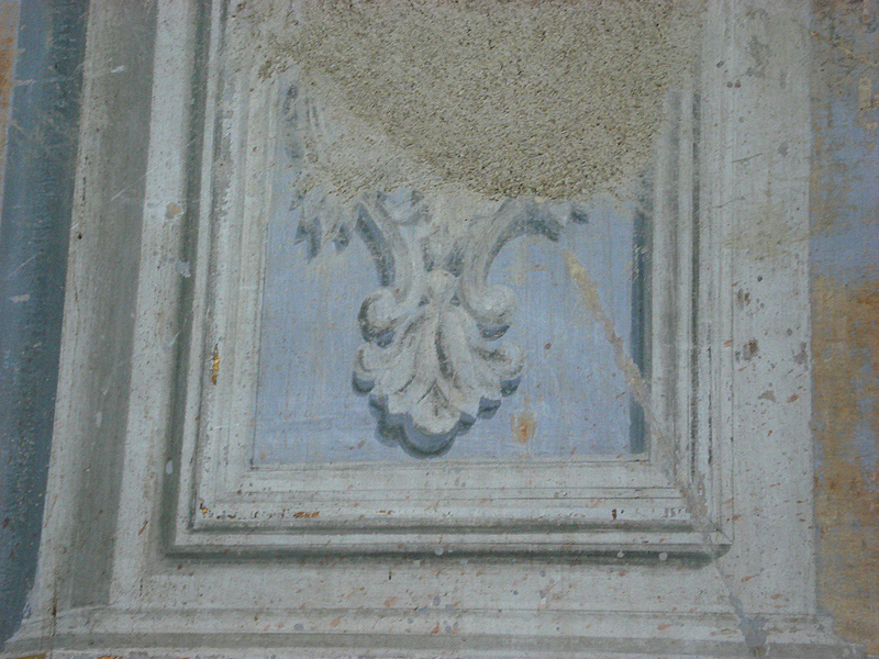 Interior da Capela Nosso senhor Jesus do Bom Fim, Porto Alegre, Brasil. Remanescente de pintura mural na capela-mor